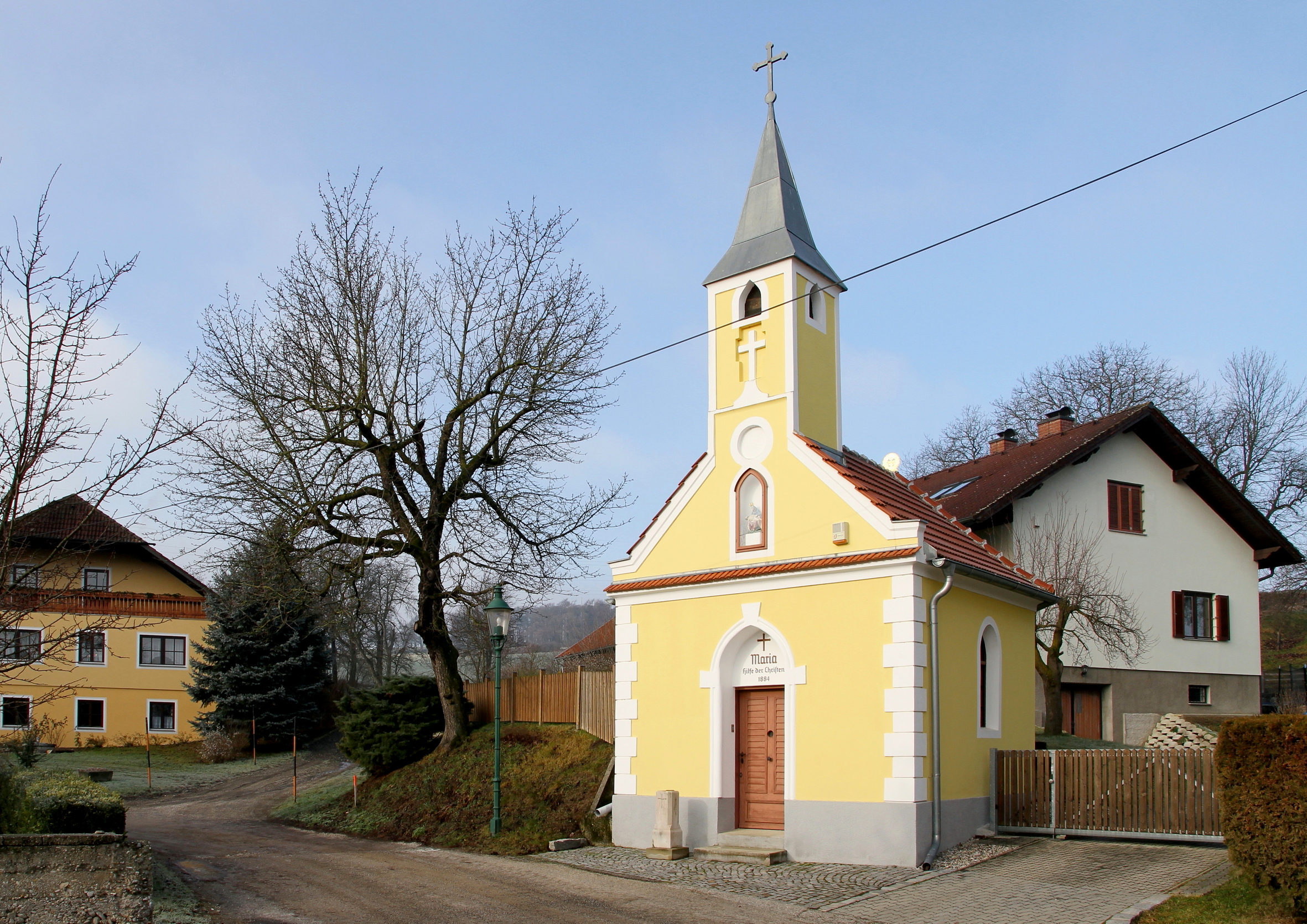 Ortskapelle hl. Corona in Kerschenberg, ein Ortsteil der niederösterreichischen Marktgemeinde Asperhofen. Ein Sakralbau aus dem Jahr 1884 mit einem Dachreiter.